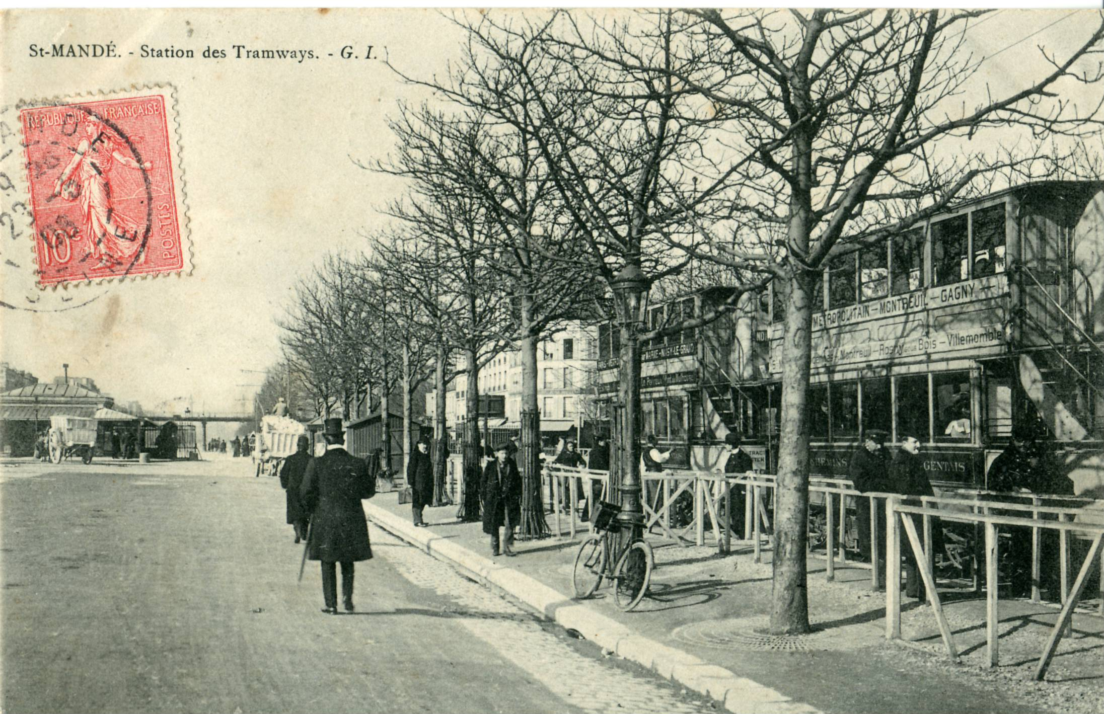 Carte postale ancienne éditée par GI SAINT-MANDÉ : Station des tramways (Chemin de fer Nogentais)